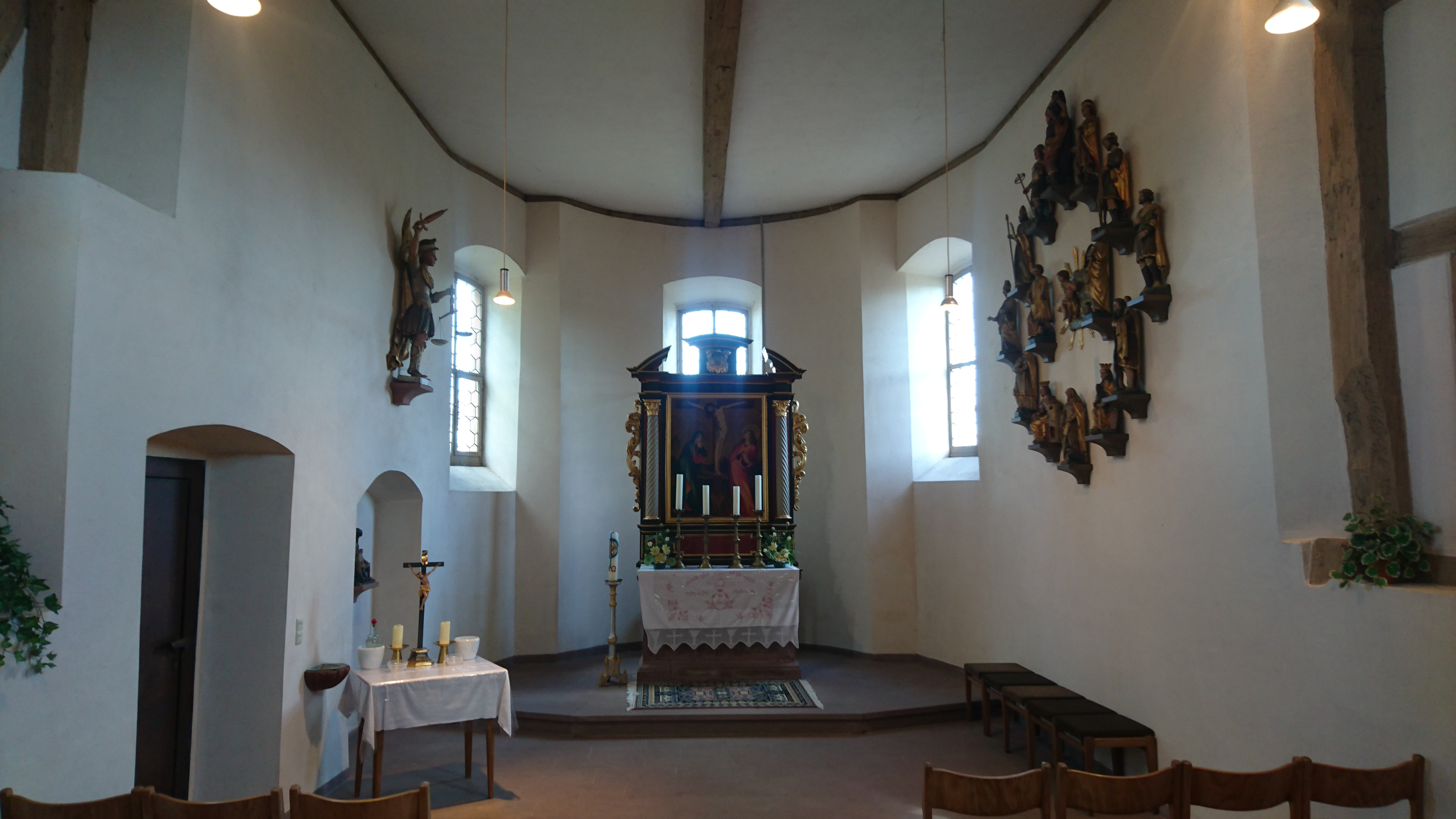 Friedhofskapelle in Hochhausen (Tauberbischofsheim) - innen